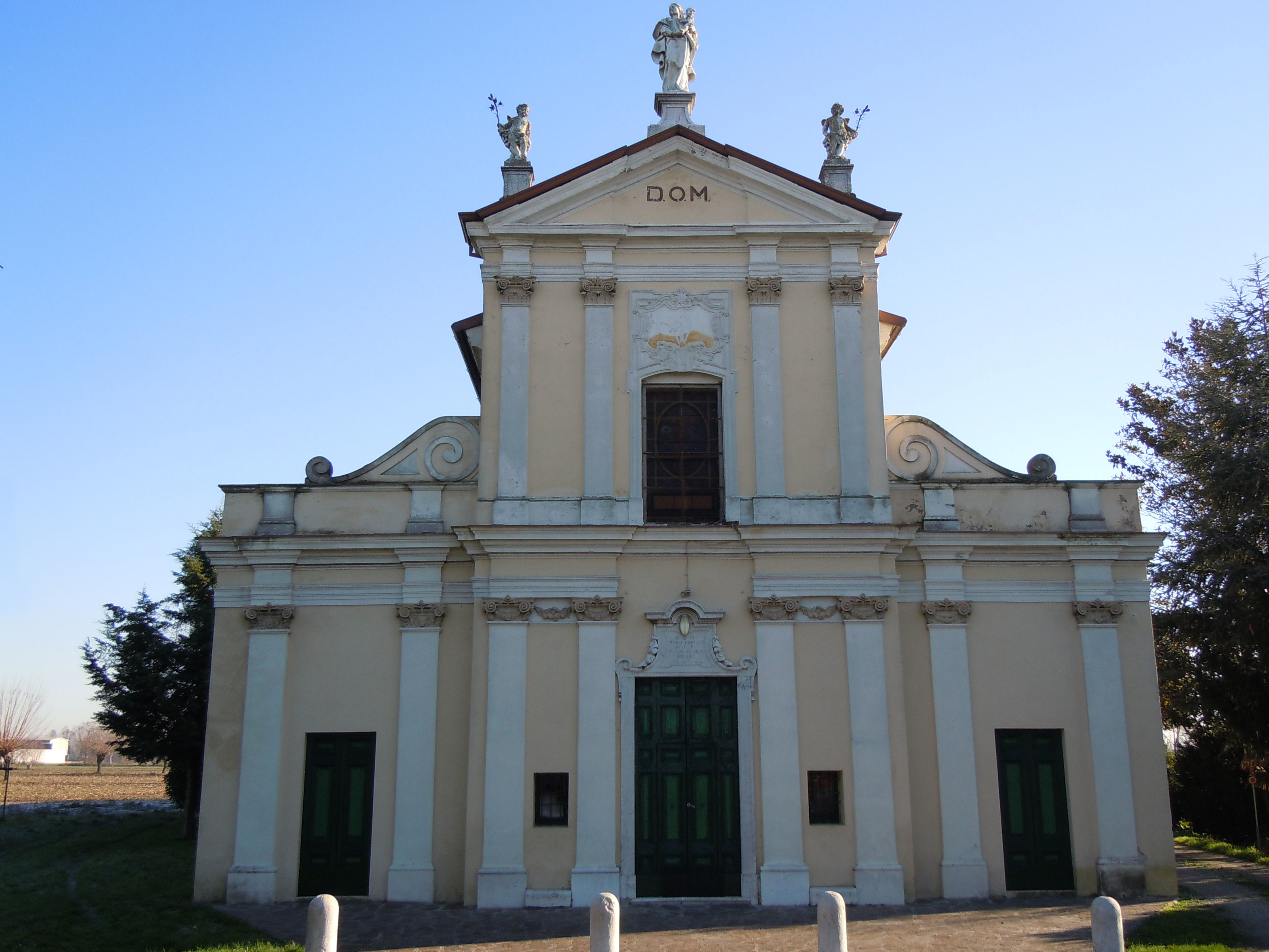 Carpenedolo - Chiesa delle Lame